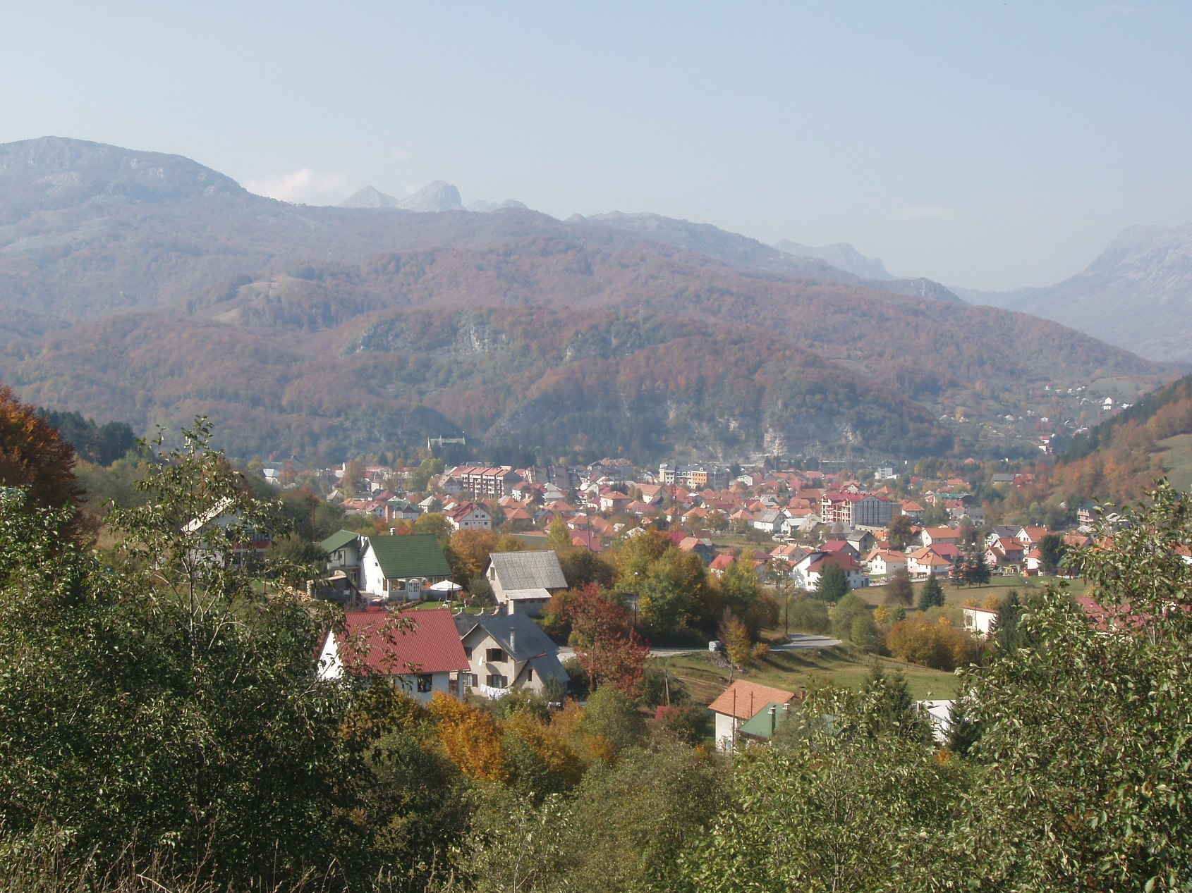 Pogled na Kolašin